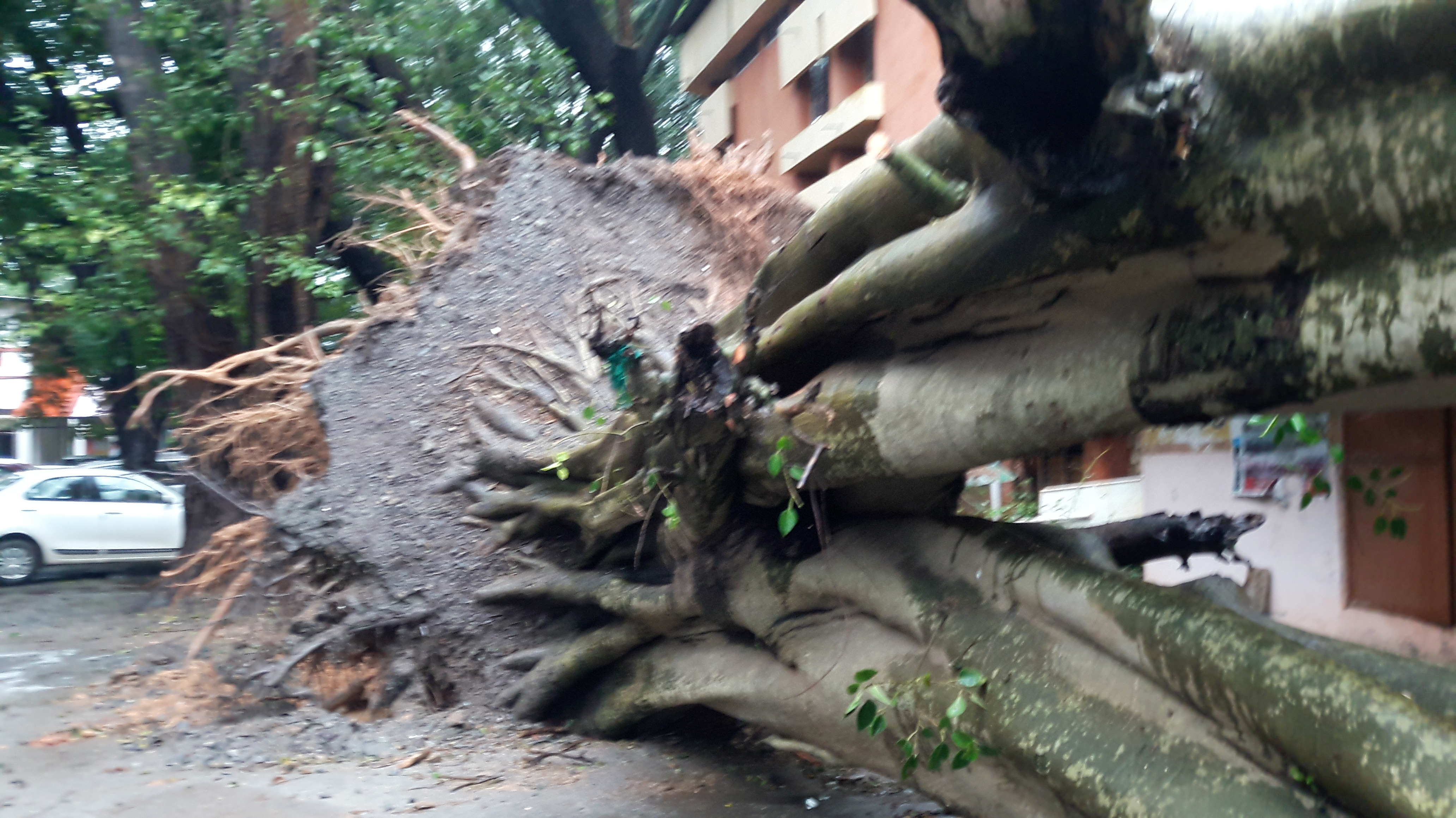 പാലക്കാട് കോടതി സമുച്ചയത്തില്‍ കാറ്റിലും മഴയത്തും കടപറഞ്ഞു വീണ ഒരു കൊയലി മരം / ചേല മരം.Indian bat tree / Indian bat fig.ശാസ്ത്രീയ നാമംFicus amplissima കുടുംബം Moraceae.